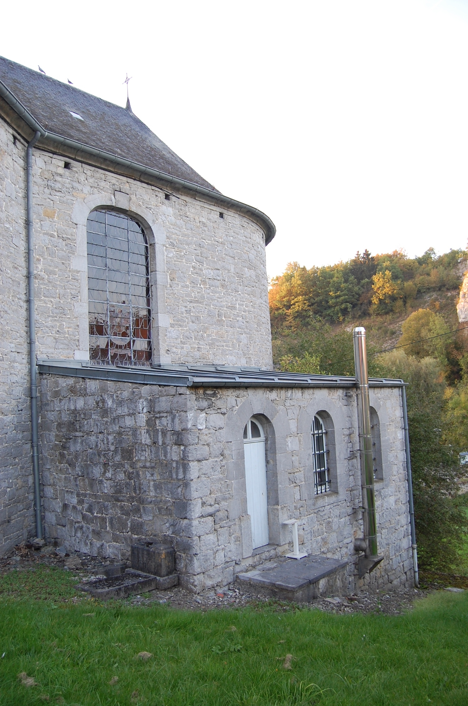 Sacristie de l'église ajointe en 1875.